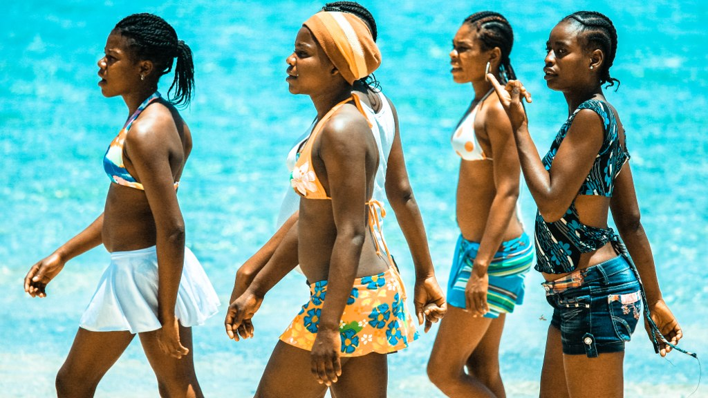 Summer Stroll